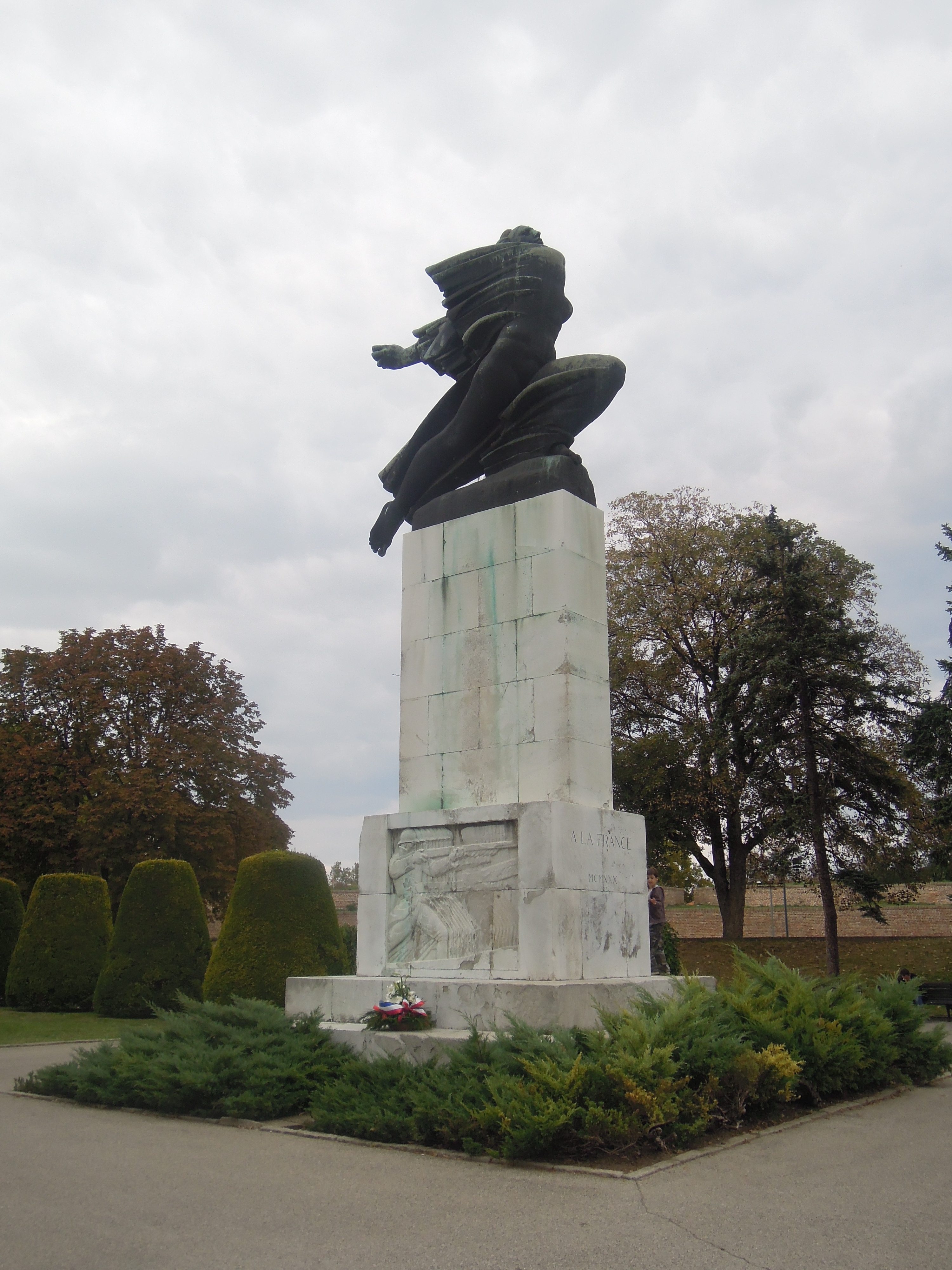 Споменик захвалности Француској на Калемегдану.